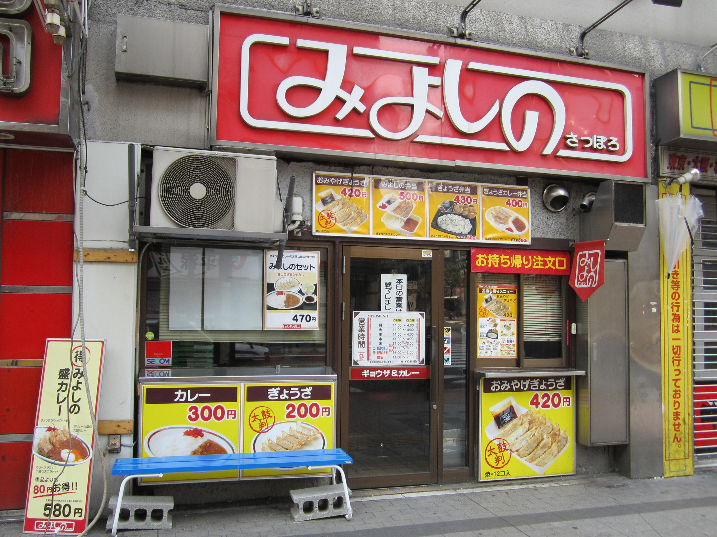 みよしのさっぽろすすきの店（北海道札幌市）